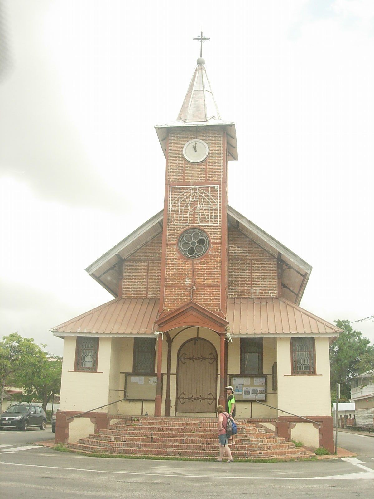 Église de Saint-Laurent du Maroni (Guyane)